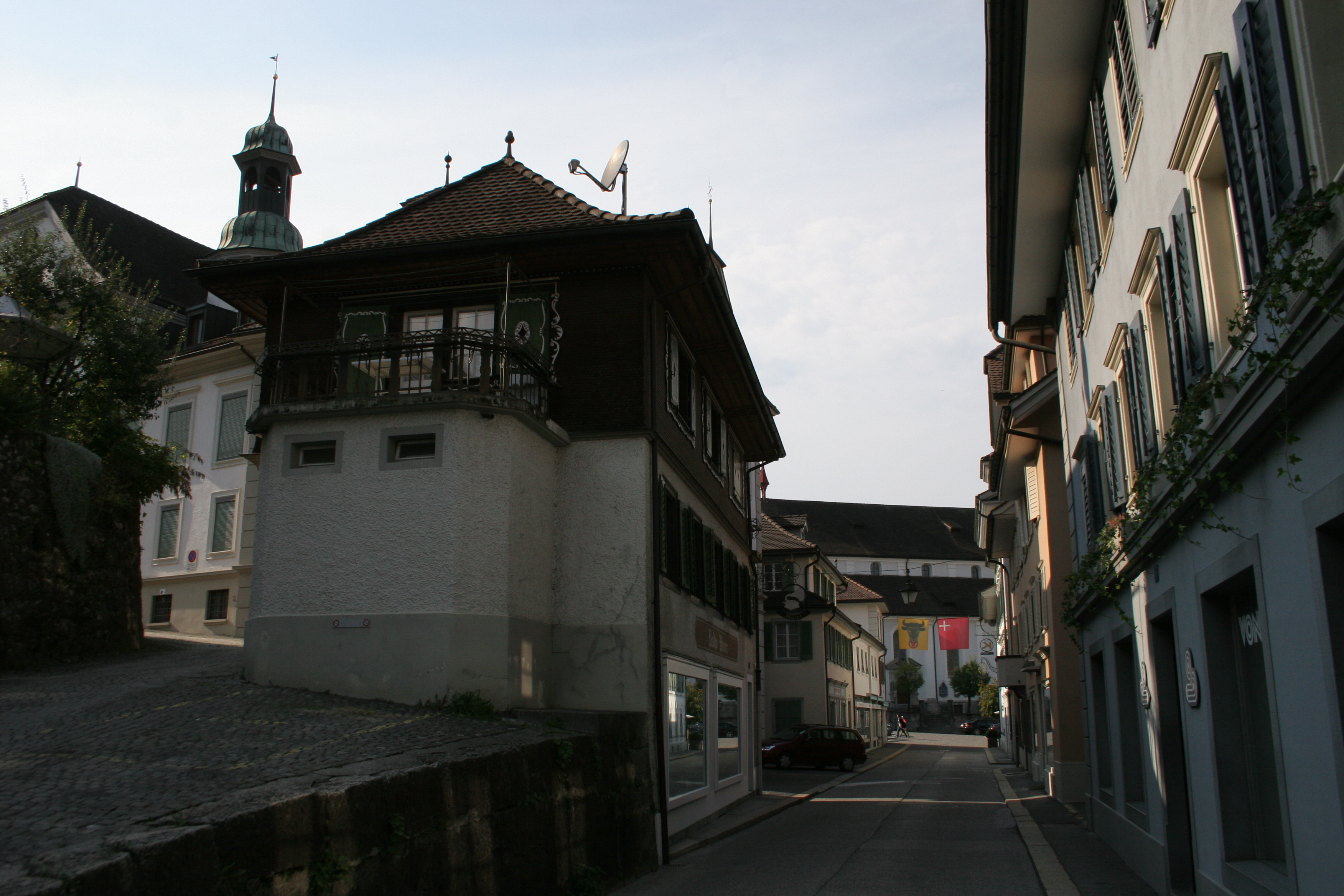 Stans (NW): Zentrum/Schmiedgasse (Schweiz)